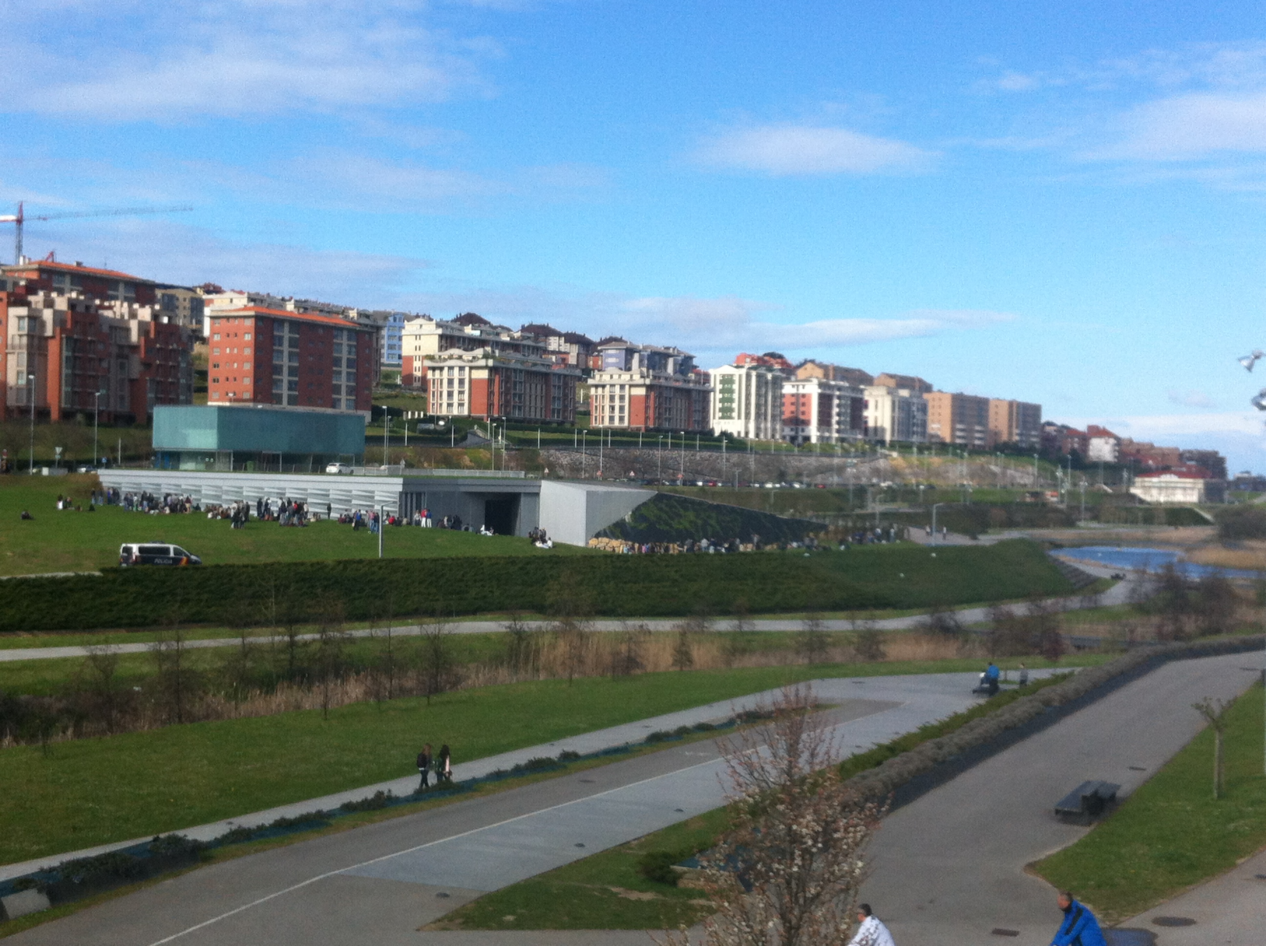 Las LLamas park. Escenario Santander building.